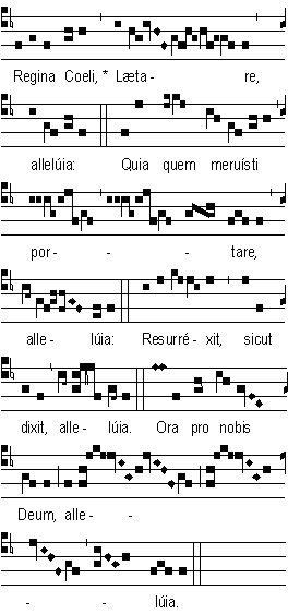 Regina coeli in gregorian notation